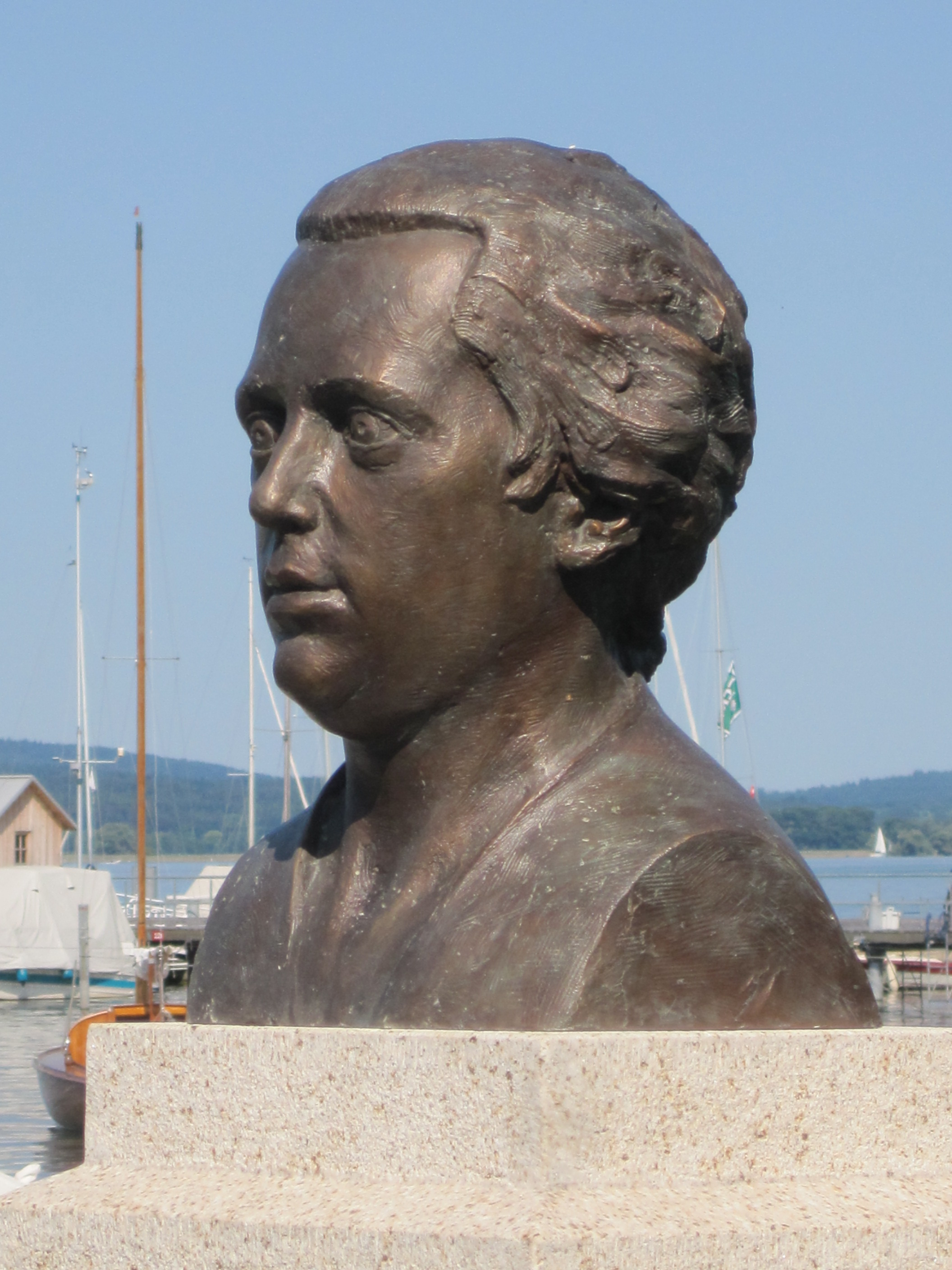 Büste Franz Anton Mesmer, Begründer des Animalischen Magnetismus Bildhauer: Friedhelm Zilly, Standort: Uferpromenade in Moos-Iznang (Bodensee). Iznang ist der Geburtsort von Franz Anton Mesmer.